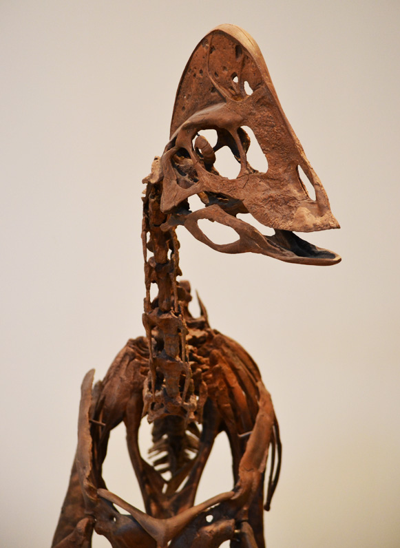 Dinosaur Bones